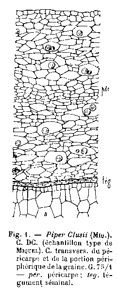 Coupe transversale du pericarpe et du portion peripherique de la graine du Piper clusii.